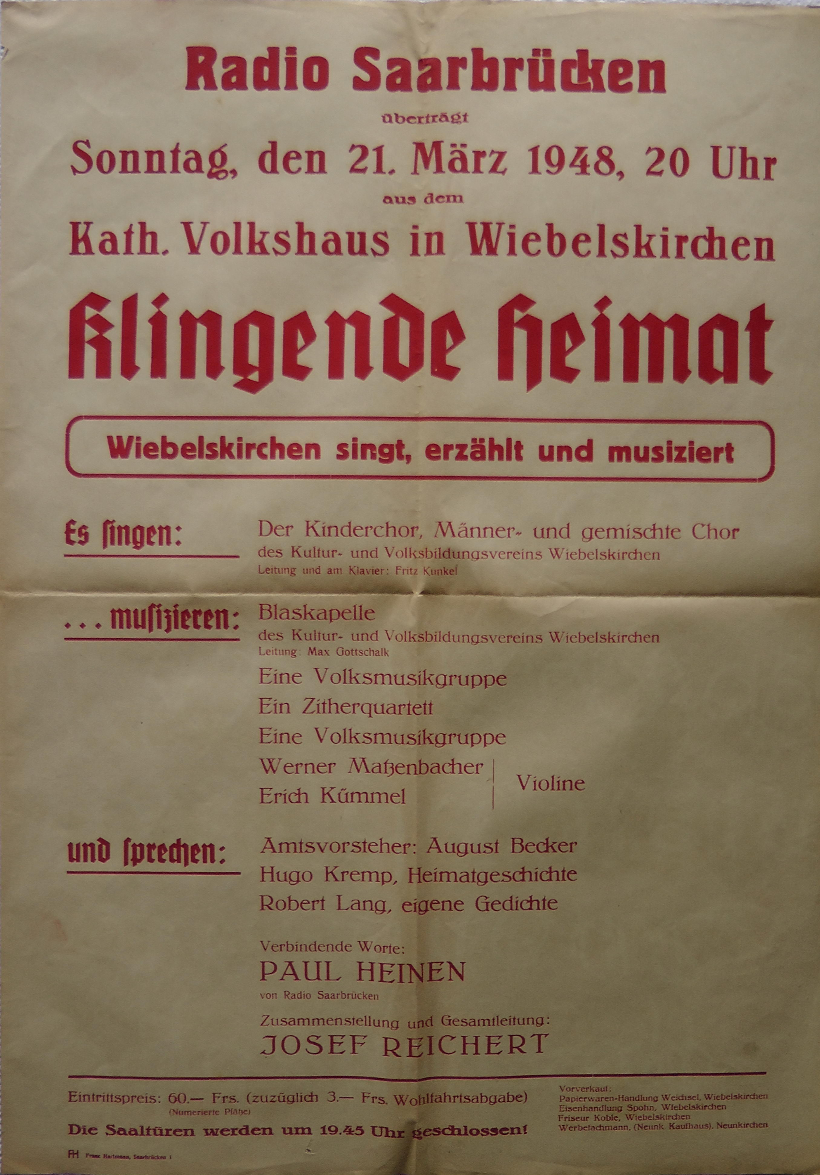 Veranstaltungsplakat 21.03.1948 Radio Saarbrücken, "Klingende Heimat", Wiebelskirchen singt, erzählt und musiziert.